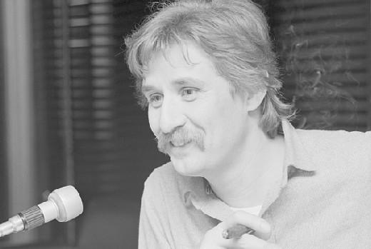 Jaap Drupsteen